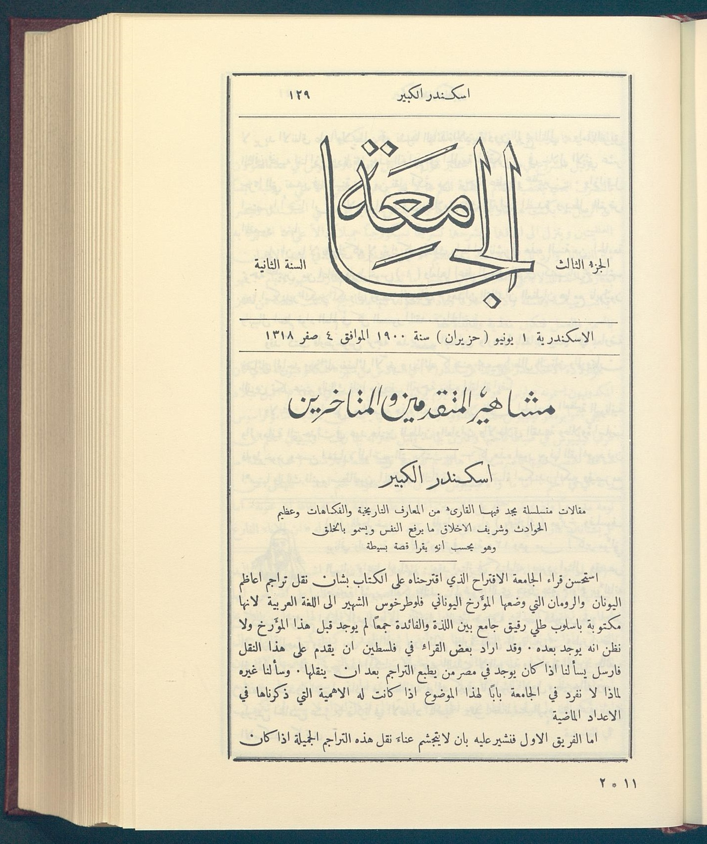 Al-Jamia, 2. Jahrgang, 3. Ausgabe (1. Juni 1900)